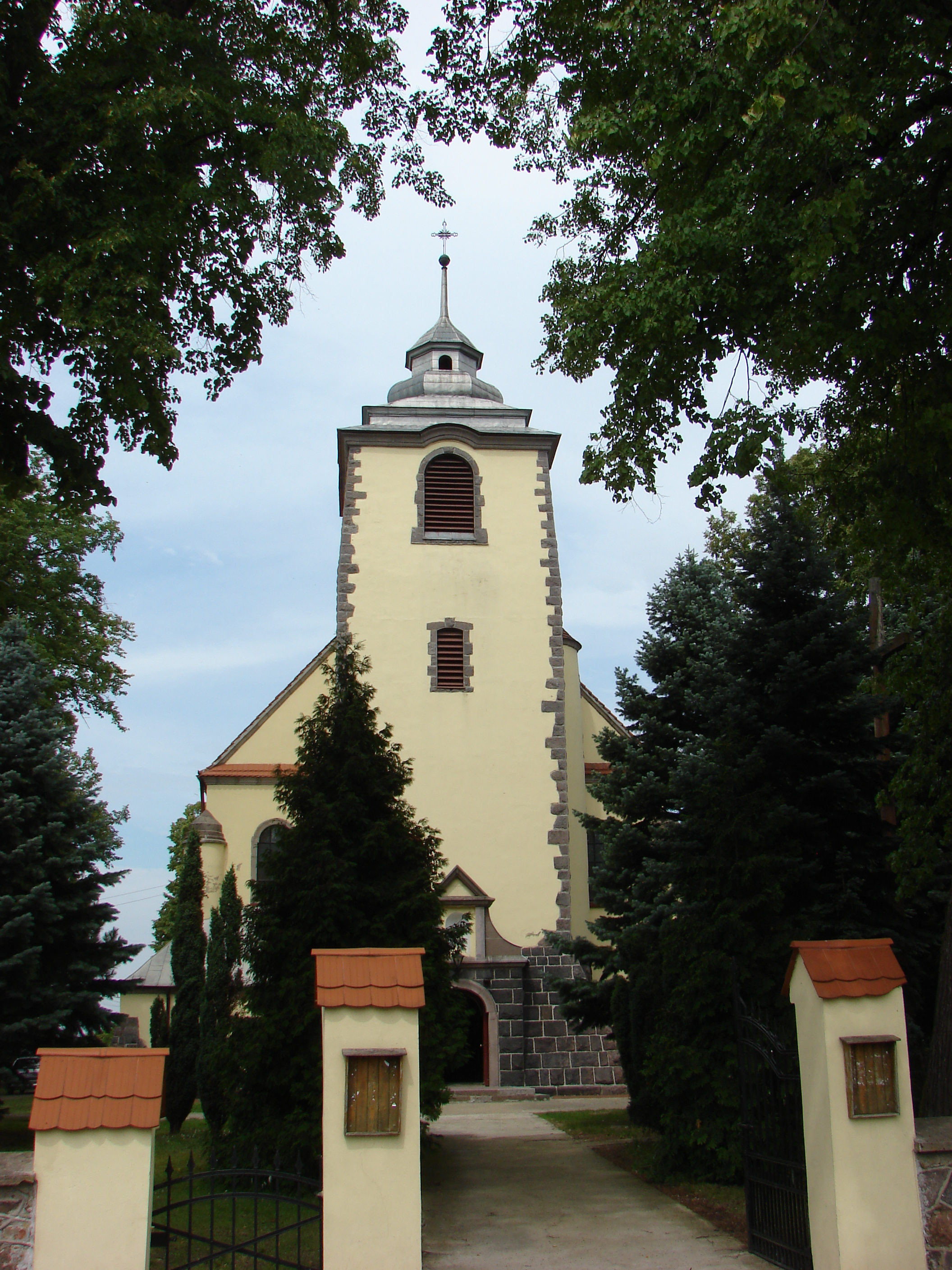 Siedlec, kościół par. p.w. św. Marcina, 1922-1930